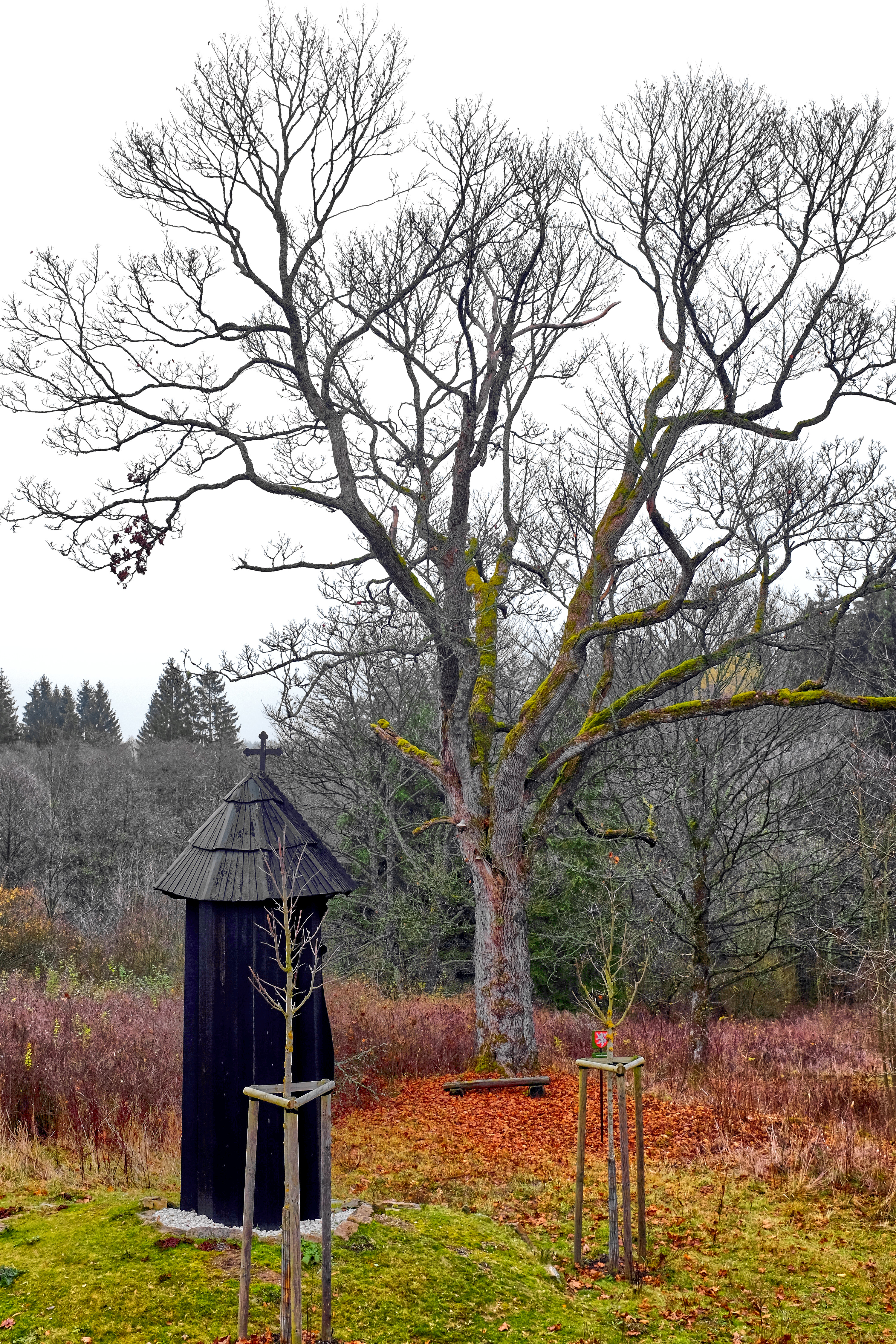 Památné stromy - Javory u obrázku - osada Háj u Staré Vody, Vysoká, část obce Stará Voda, okres Cheb